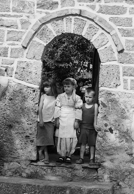 Косово и Метохија: Мали хришћани у Великој Хочи. Фотографије из пројекта "Корени душе". Фото:Дарко Дозет